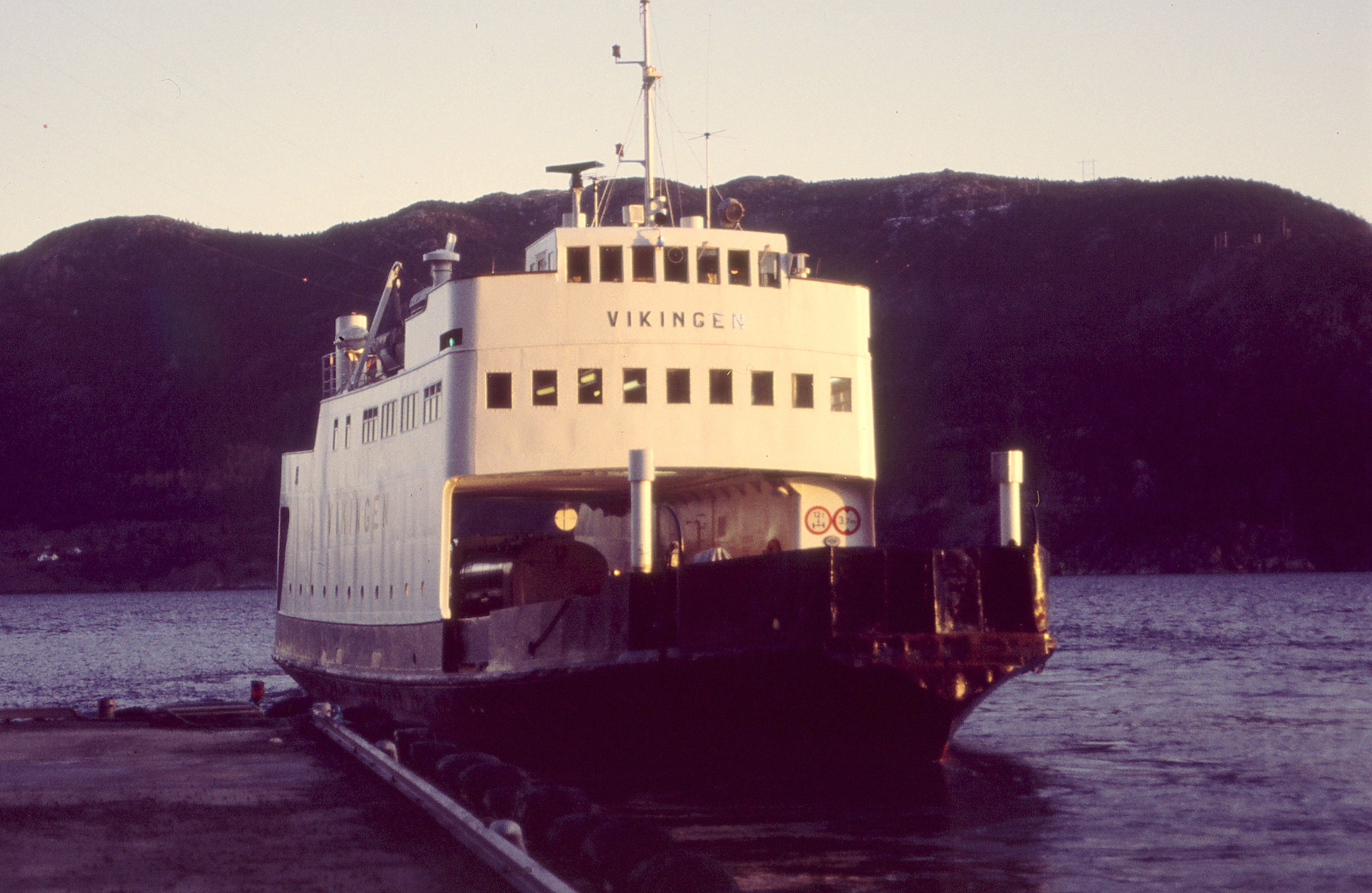 MF Vikingen ved Jektevik i 1985 Foto Harald Sætre